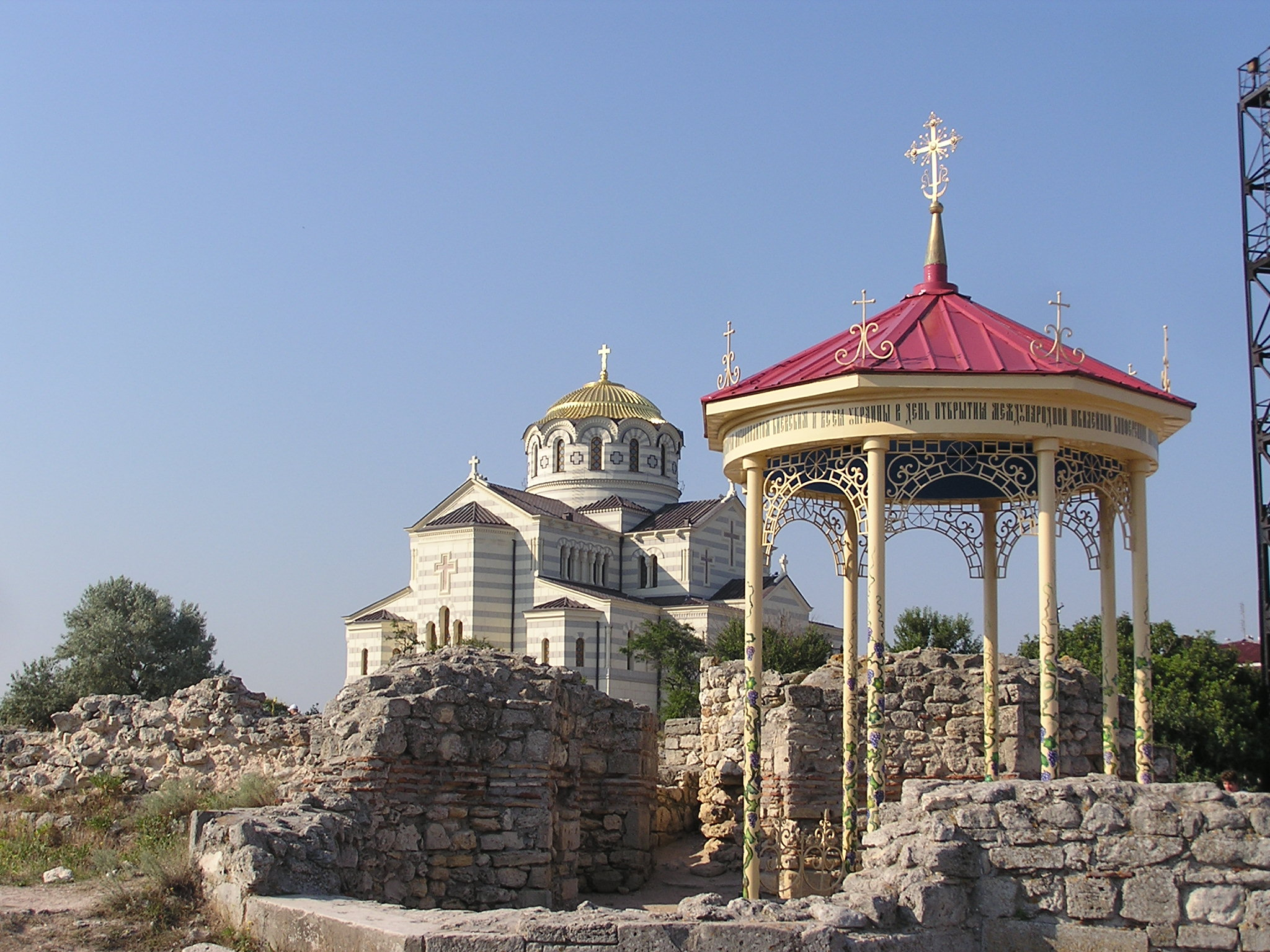 Херсонес. Баптистерий с ротондой